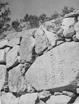 מצבה שנלקחה מאחד מבתי הקברות היהודיים בירושלים (הר הזיתים או סמבוסקי) והוצבה כחלק מגדר על ידי חיילי הלגיון הירדני לאחר 1948.